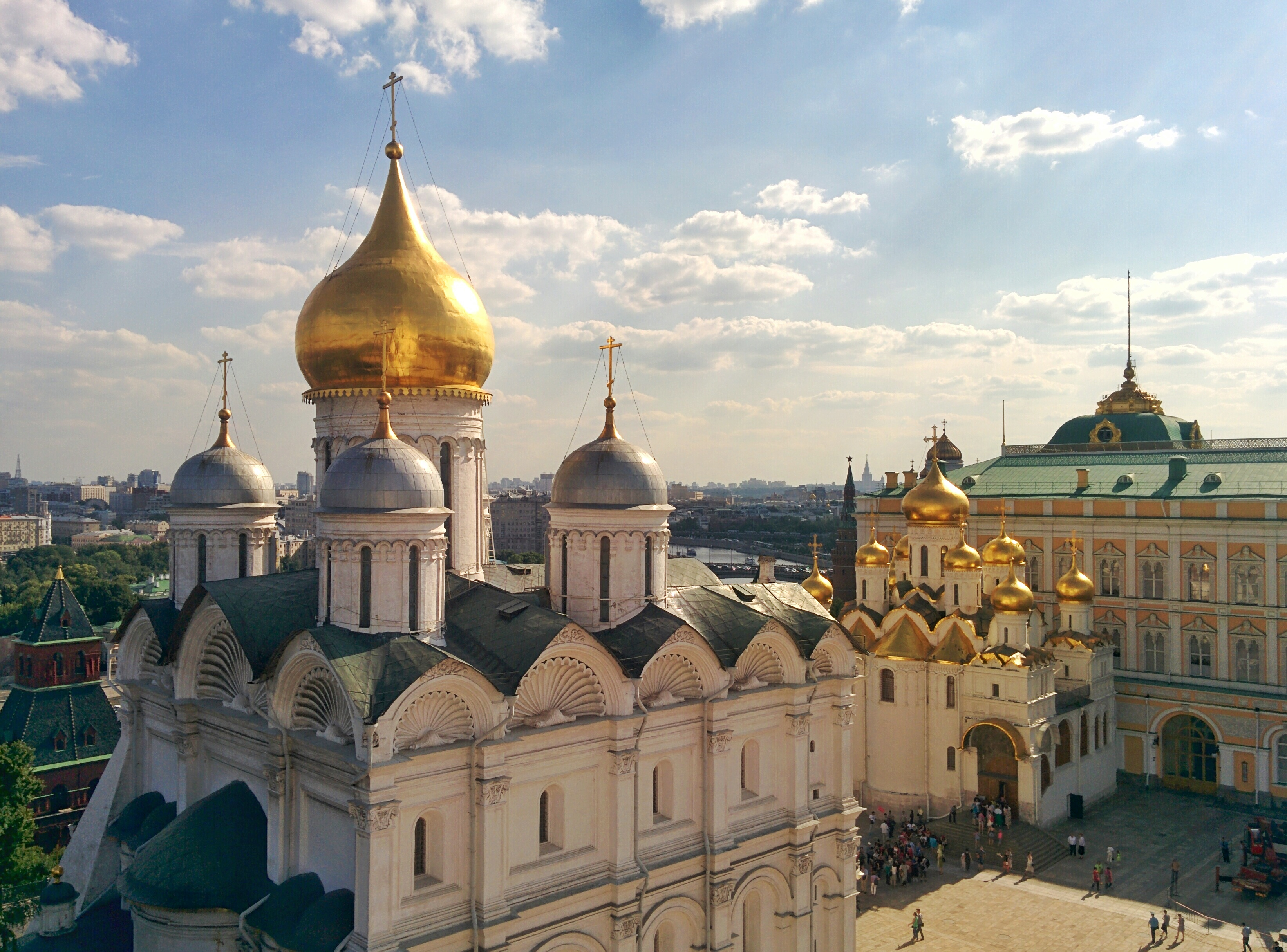 Архангельский собор: нет адреса БТИ, Тверской, Центральный округ, Москва